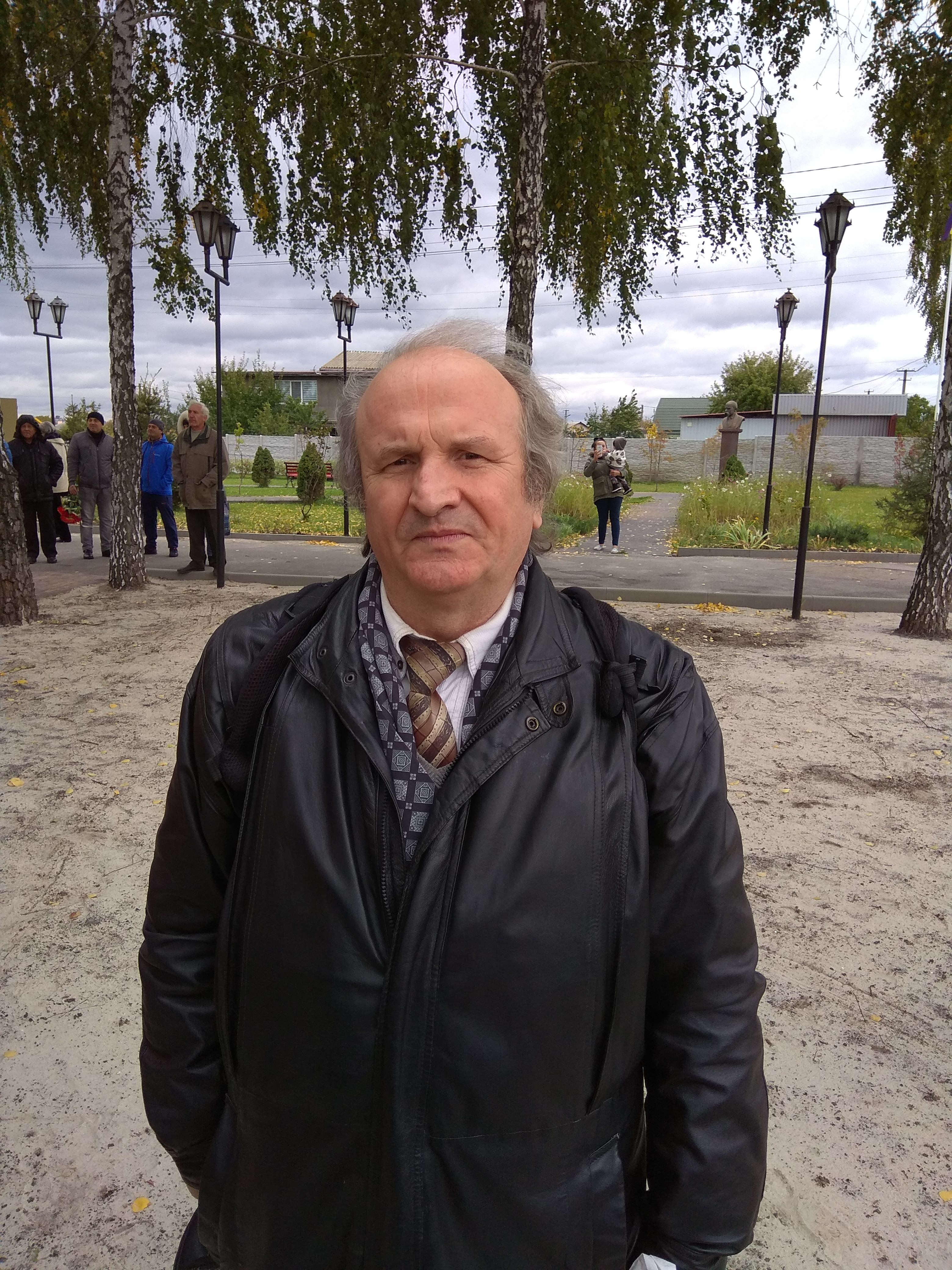 Якубівський Михайло Михайлович 14 жовтня 2017, в селі Гатне під час відкриття памятника Валерію Марченку.